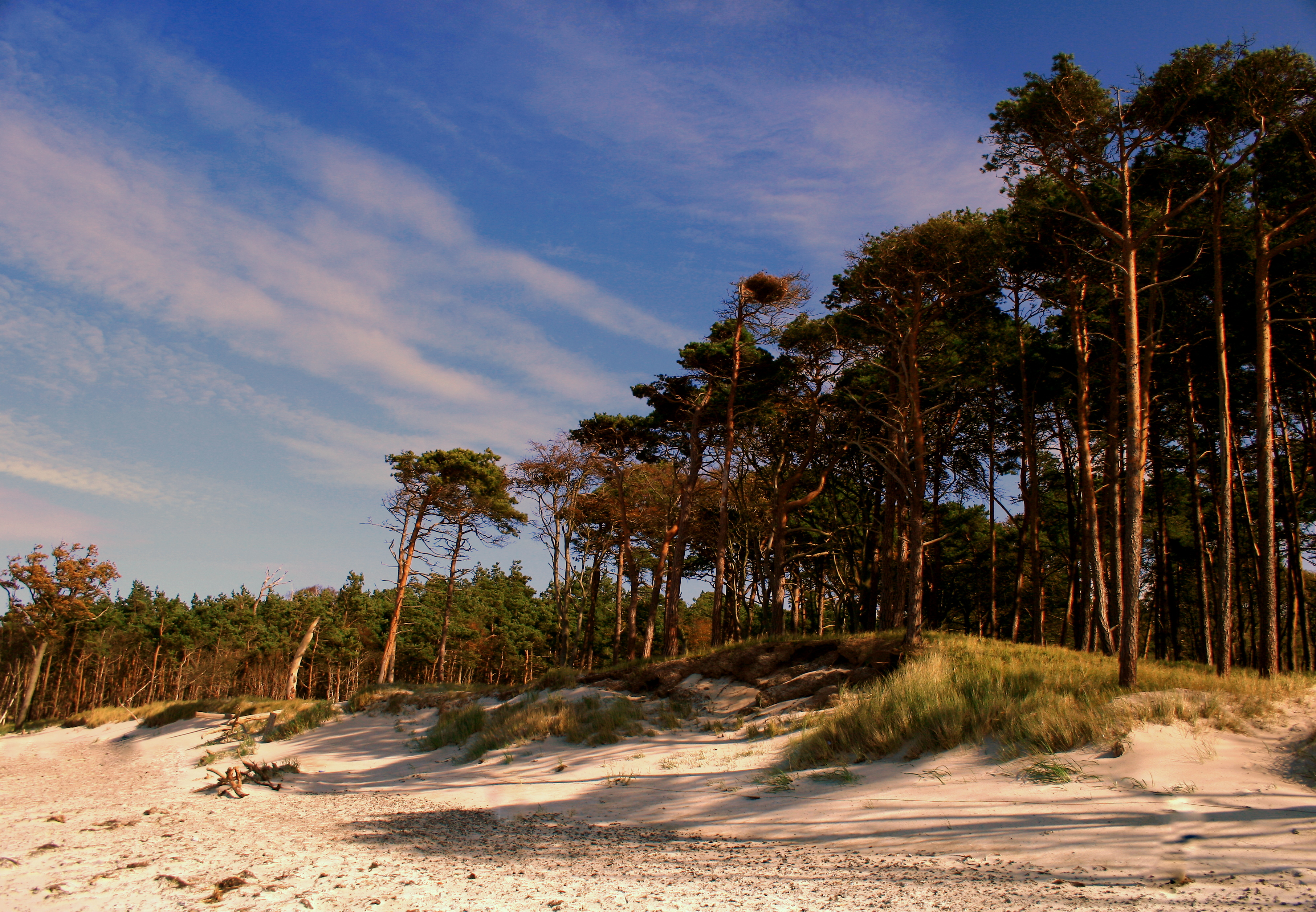 Weststrand auf Fischland-Darss-Zingst/MV